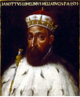 Dipinto del doge Giannotto Lomellini